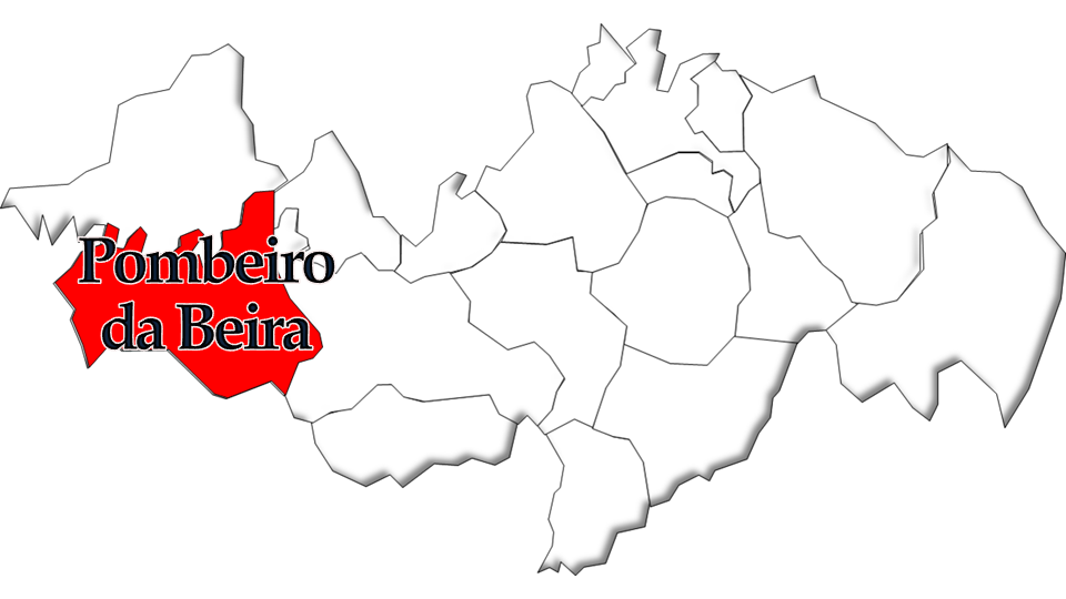 População